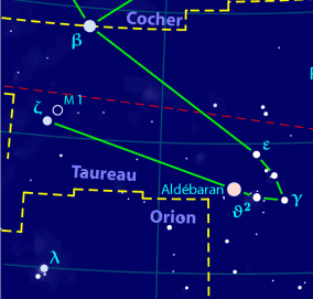 Carte pour la constellation Taureau Produite à l'aide du logiciel PP3